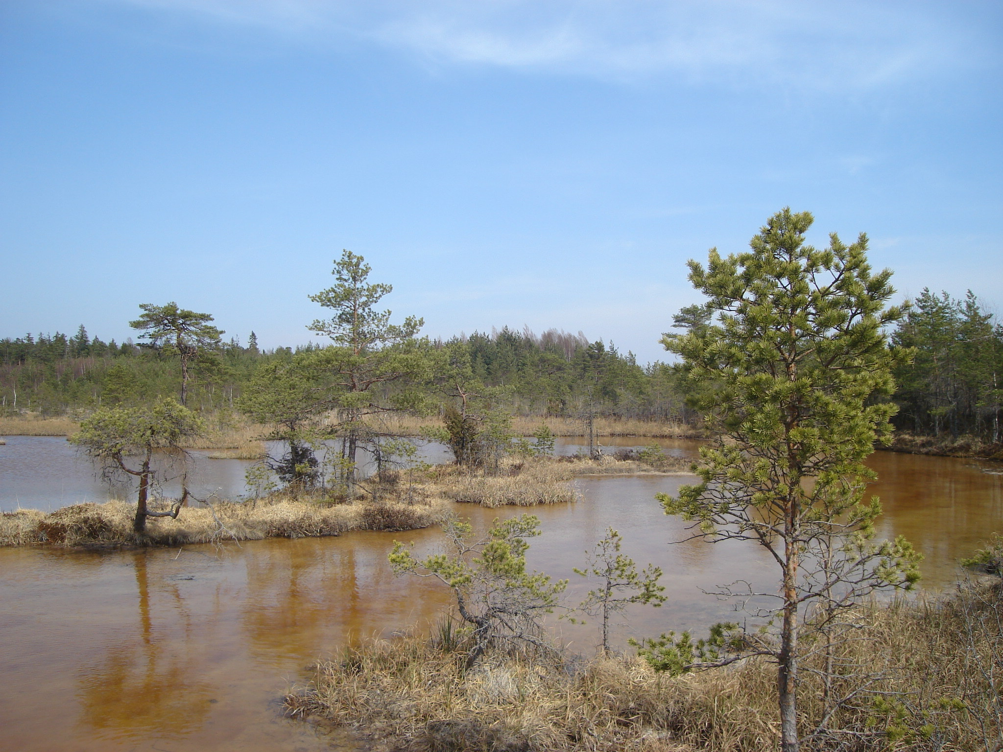 Lapmežciems Parish, Latvia